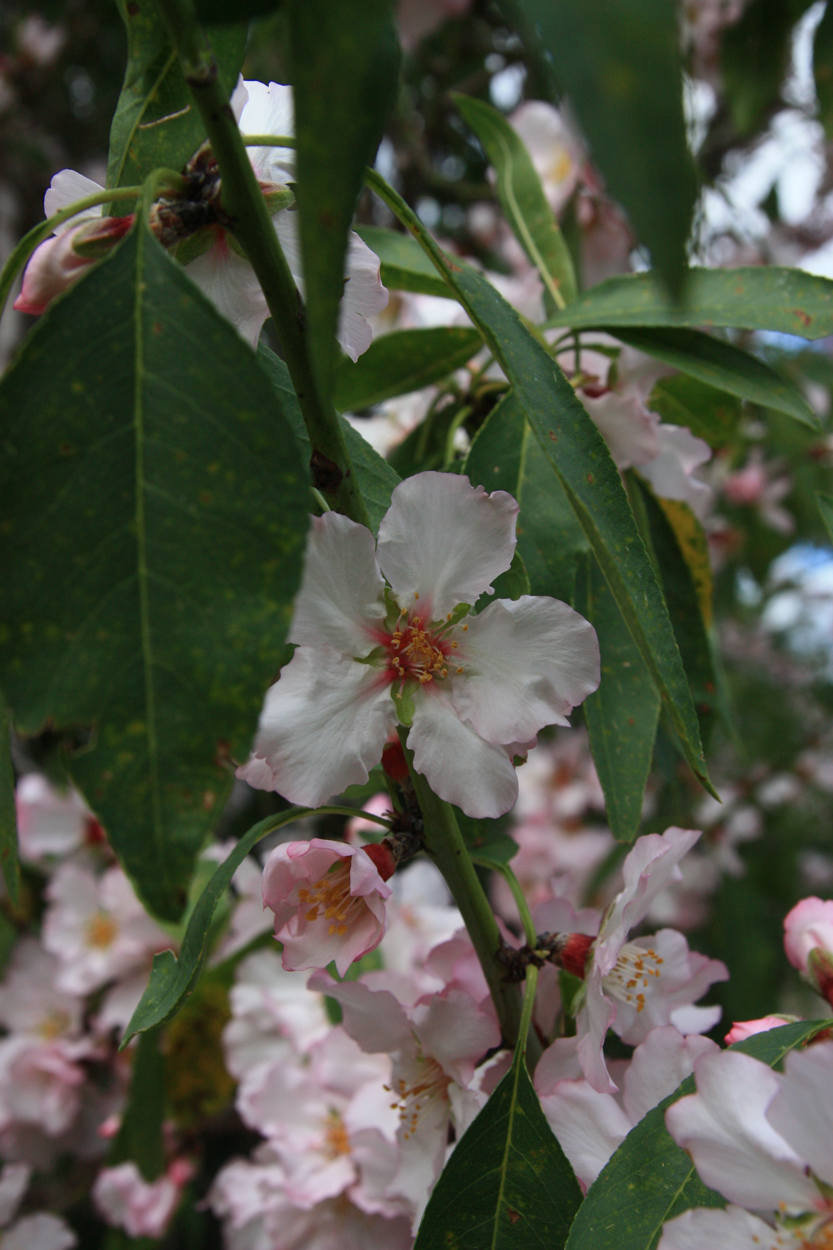 חורשת המייסדים - גבעת השבשבת, נוה שאנן חיפה enI Founders Grove - Pinwheel Hill Haifa